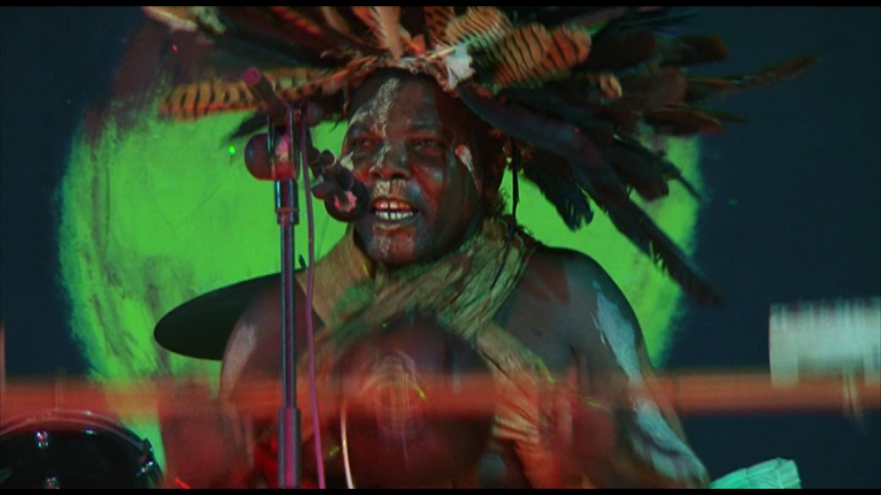 4e édition du Festival Feux de Brazza 2010 - Festival Populaire et International des Musiques Traditionnelles.